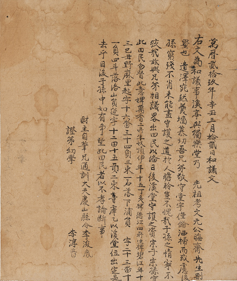 보물 제1473-64호 이준형제화의문